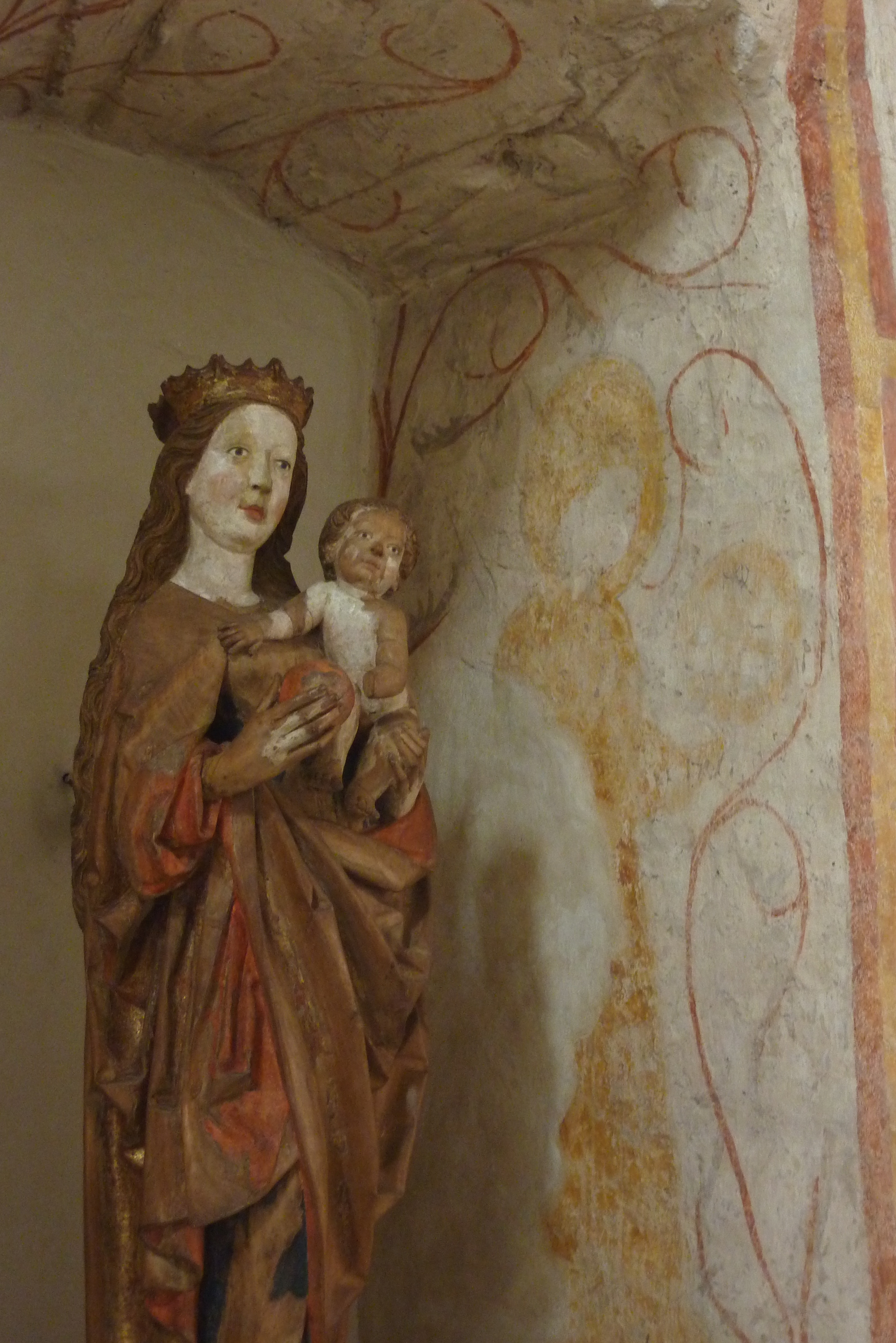 Evangelische Kirche, ehemals St. Marien, in Kempfenbrunn, einem Ortsteil von Flörsbachtal im Main-Kinzig-Kreis (Hessen), Holzskulptur Madonna mit Kind, Anfang 16. Jahrhundert